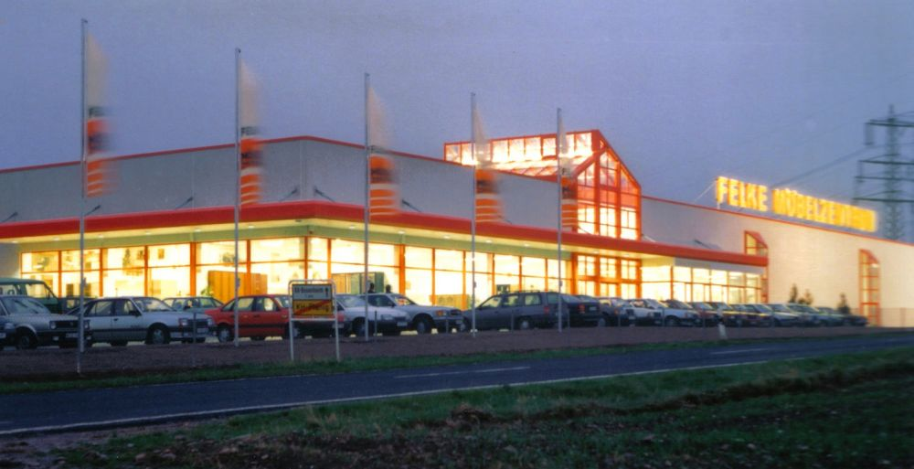 FELKE-Möbelzentrum in Bad Kreuznach